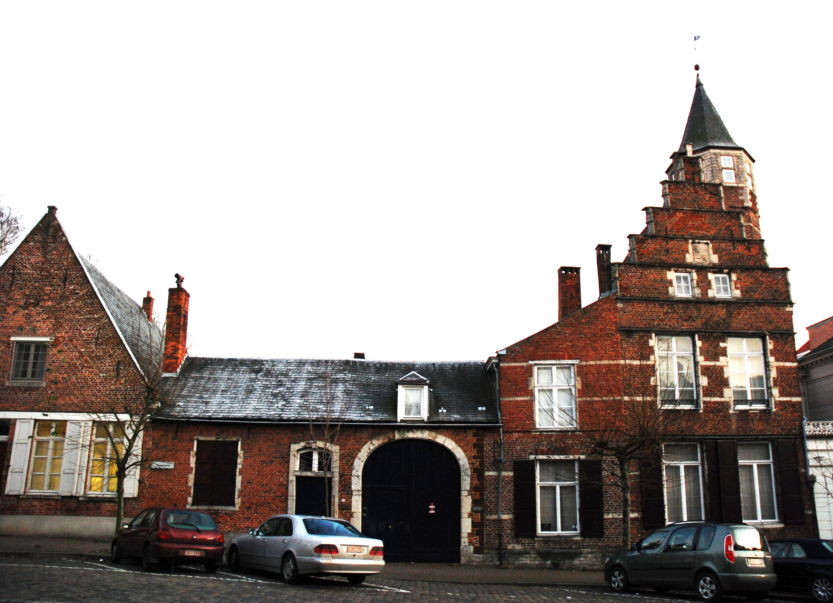 Het Hof van Nassau uit 1510, residentie van de Prinsen van Oranje-Nassau te Diest, België